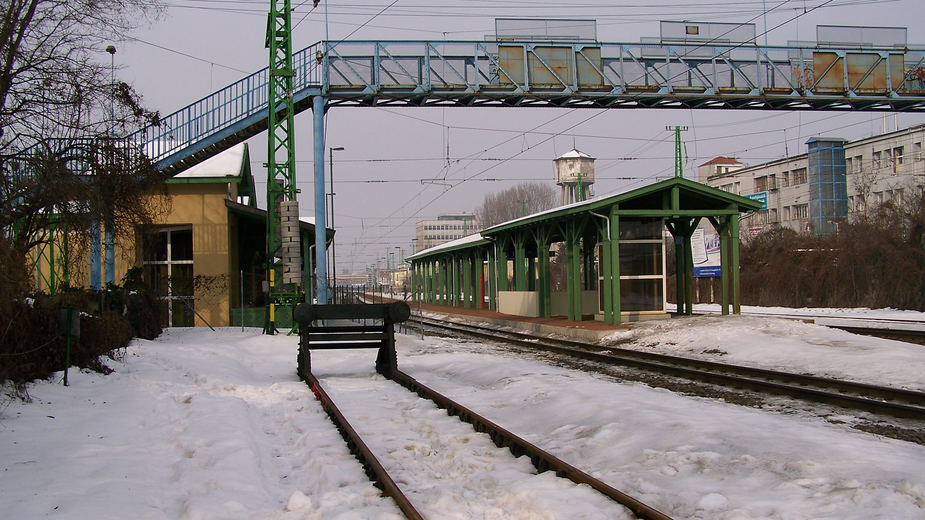 Pestszentlörinci állomás